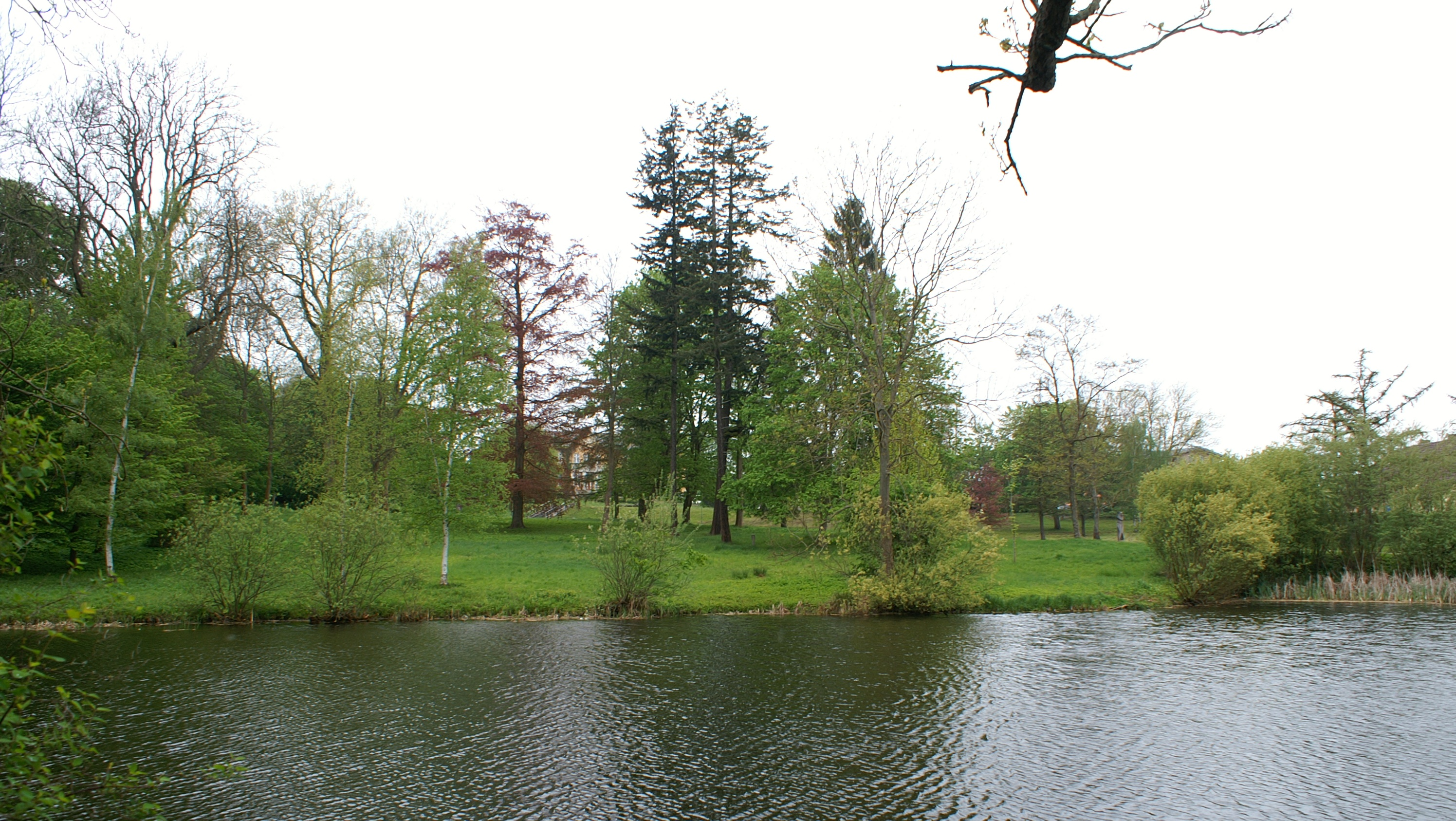 Schlosspark in Wieck bei Gützkow (Landkreis Ostvorpommern)